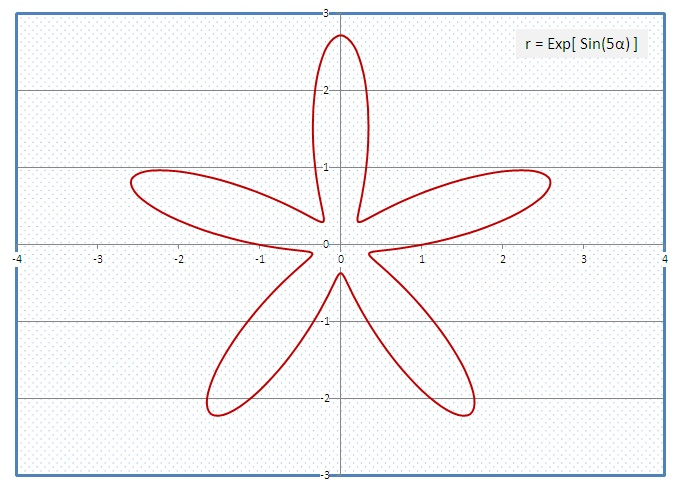 r = Exp[ Sin(5α)